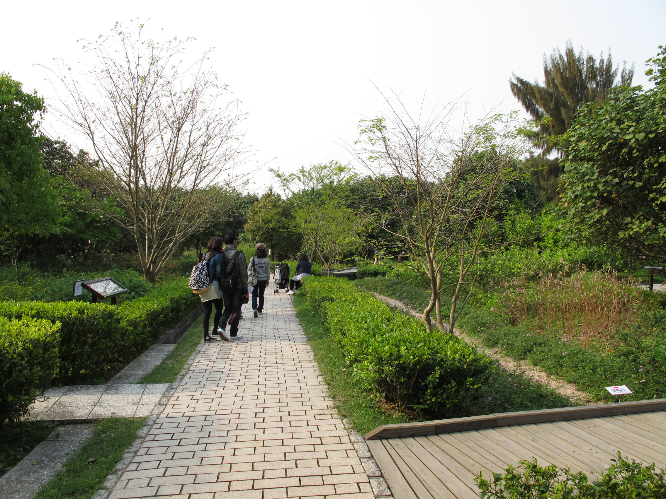 Hong Kong Wetland Park Butterfly Garden